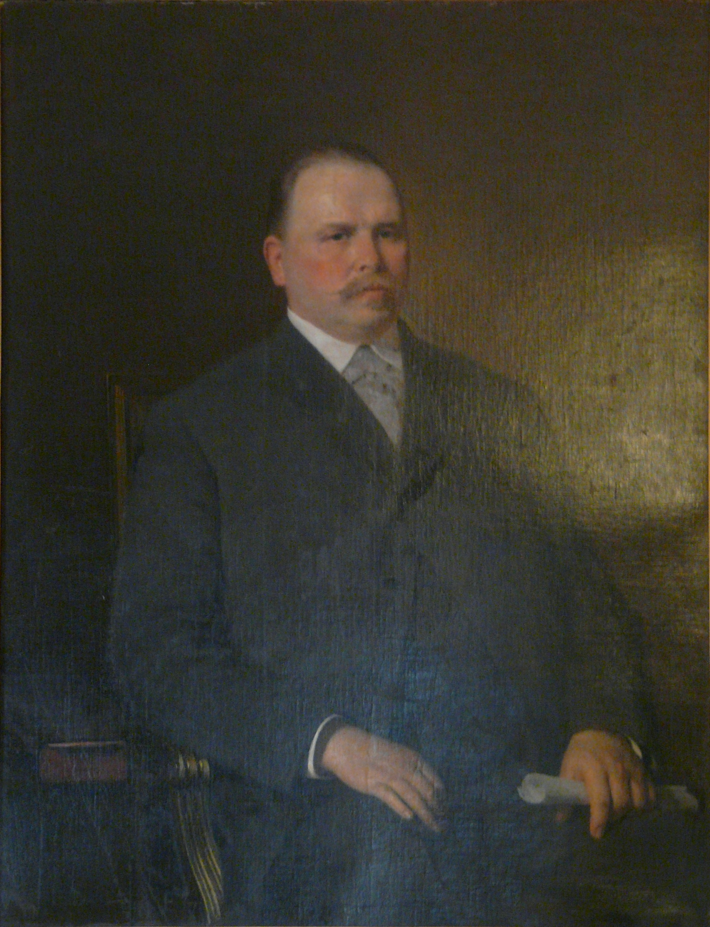 Portret Zygmunta Glogera. K. Miller. Olej, półtno.